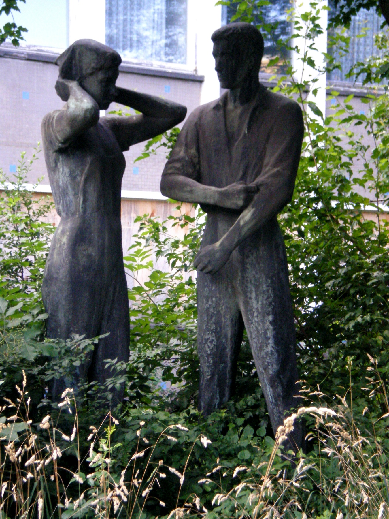 "Arbeitergruppe" vom Dresdner akademischen Bildhauer Wilhelm Landgraf in Dresden Dobritz ehemals Schokopack - 1963